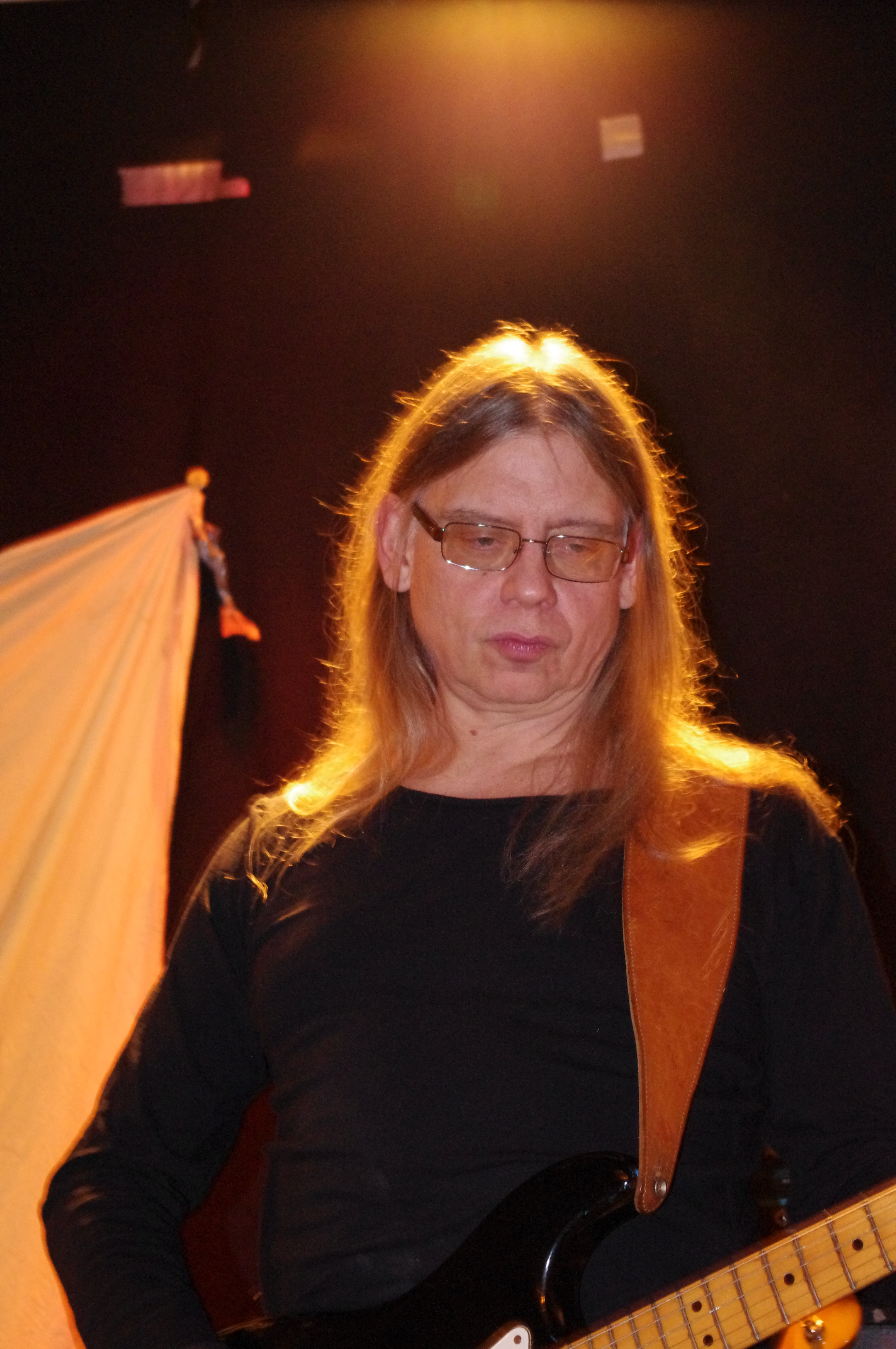 Lars "Guld-Lars" Jonson med Köttgrottorna på Kafé 44, 13 december 2011.